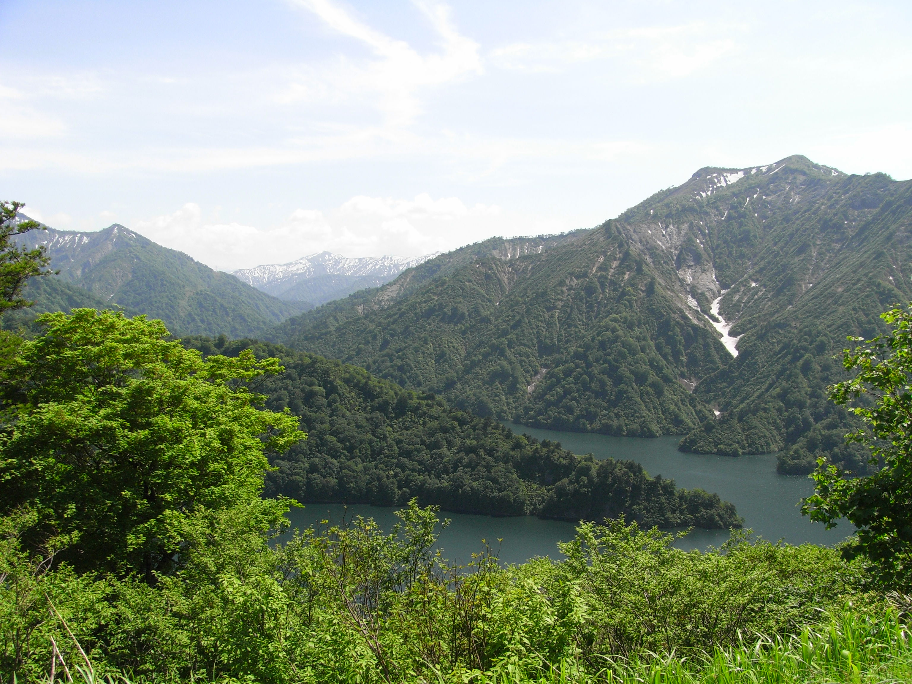 Lake